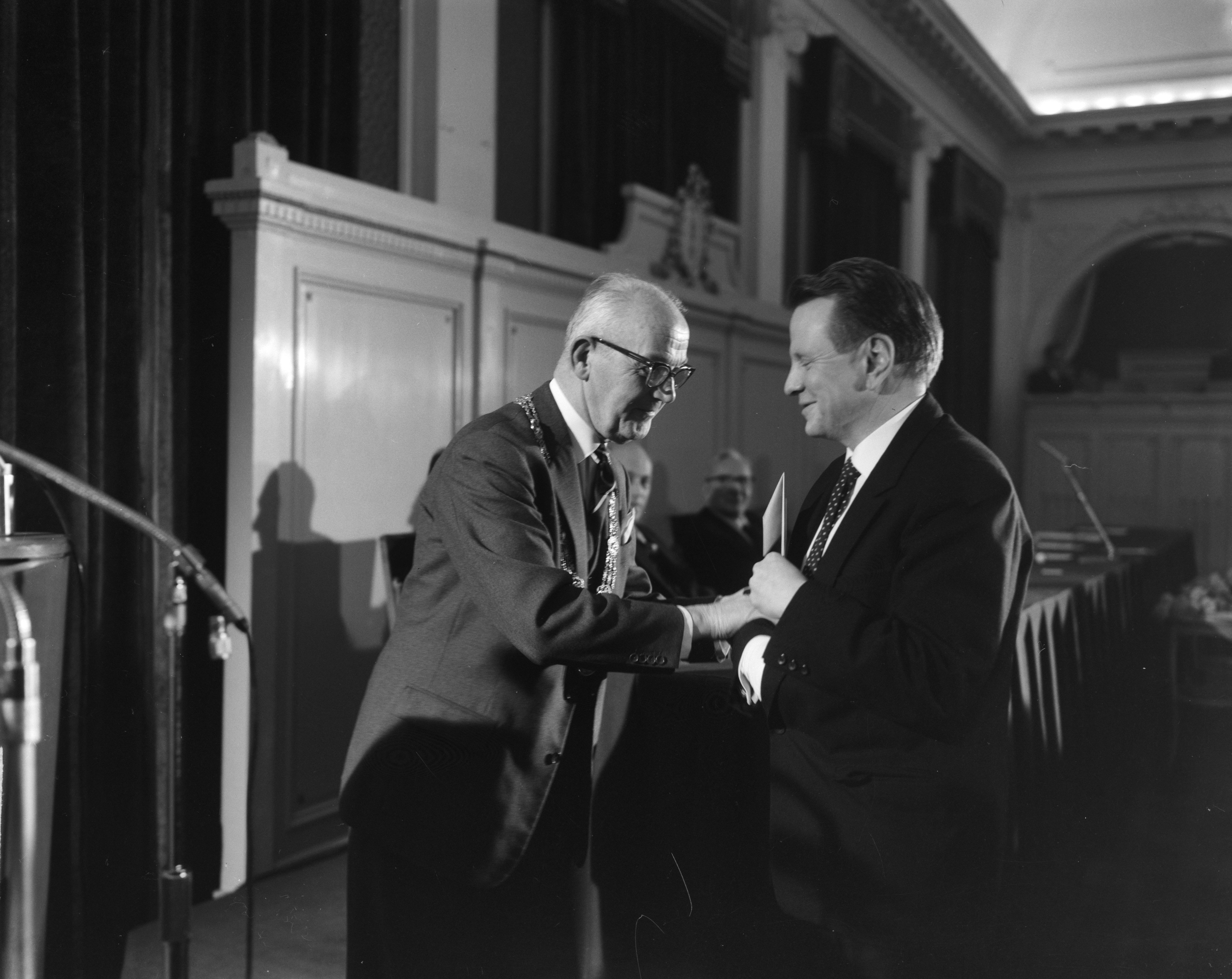 Prijsuitreiking Jan Campertprijs in Den Haag, J.W. Holsbergen en burgemeester Kolfschoten Datum 19 december 1962